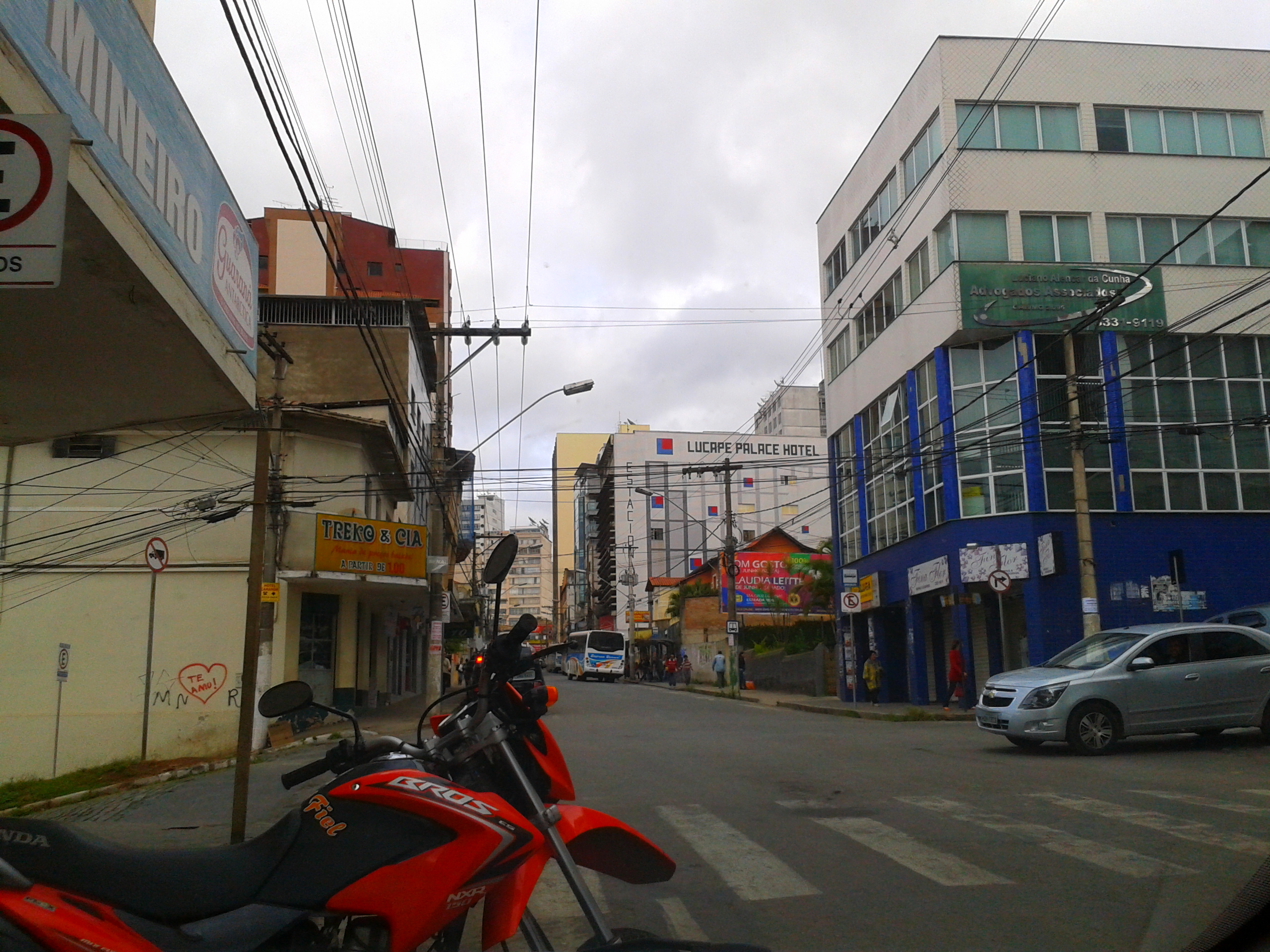 Imagem de Barbacena